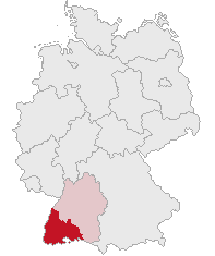 Regierungsbezirk Freiburg, Baden-Württemberg, Germany